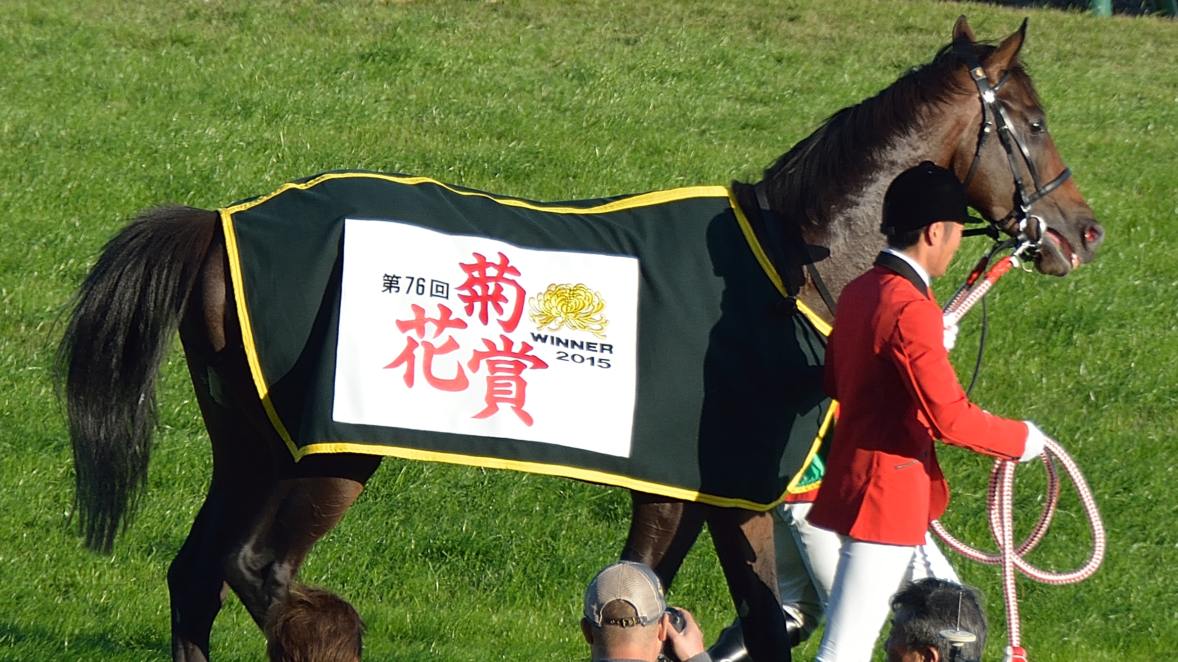 2015年10月25日に京都競馬場で行われた「第76回菊花賞」で、勝利馬用の馬着を着装した勝利馬キタサンブラックを、観客席から撮影したもの。